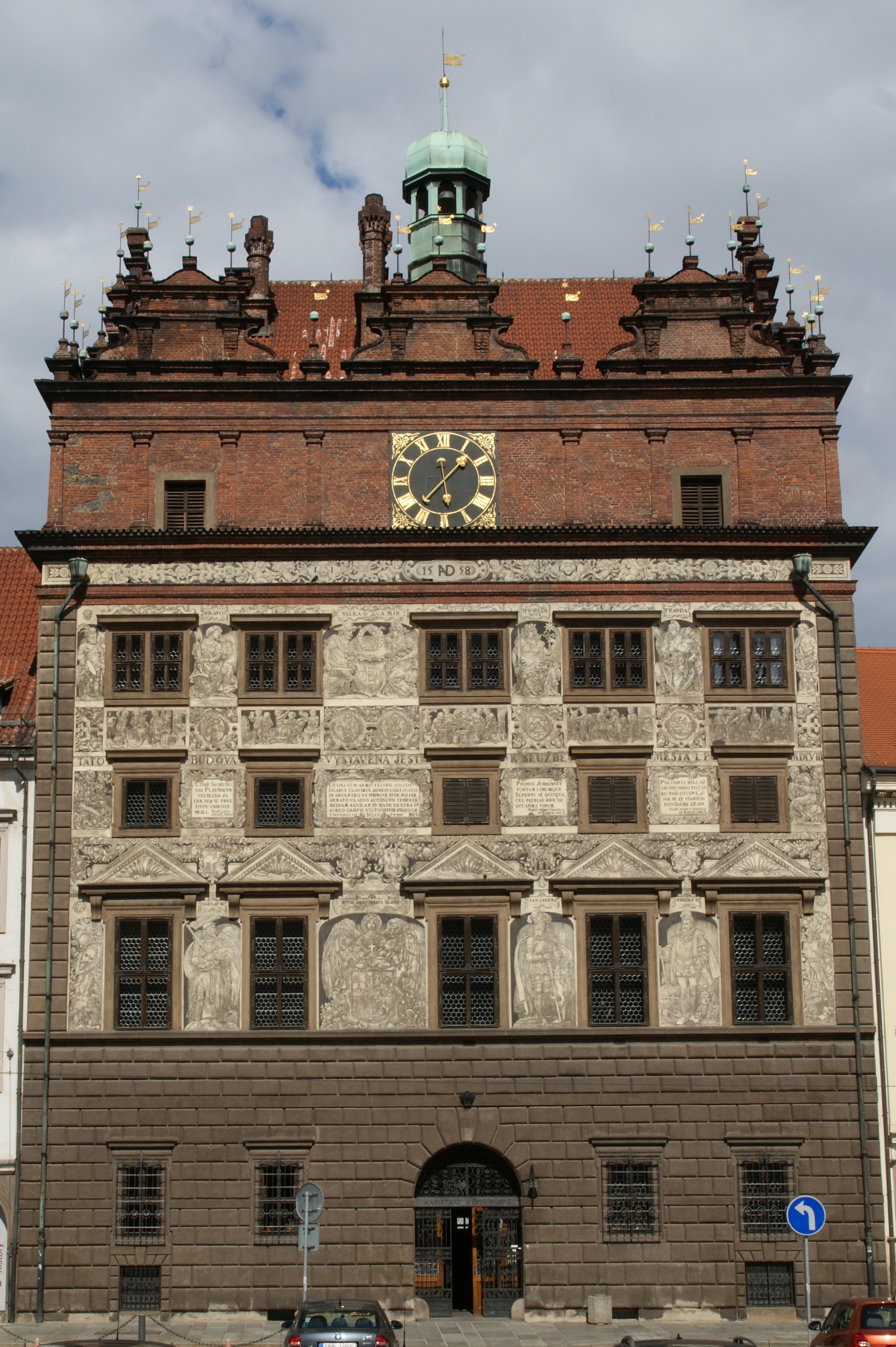 Radnice, náměstí Republiky 1/1, Plzeň.